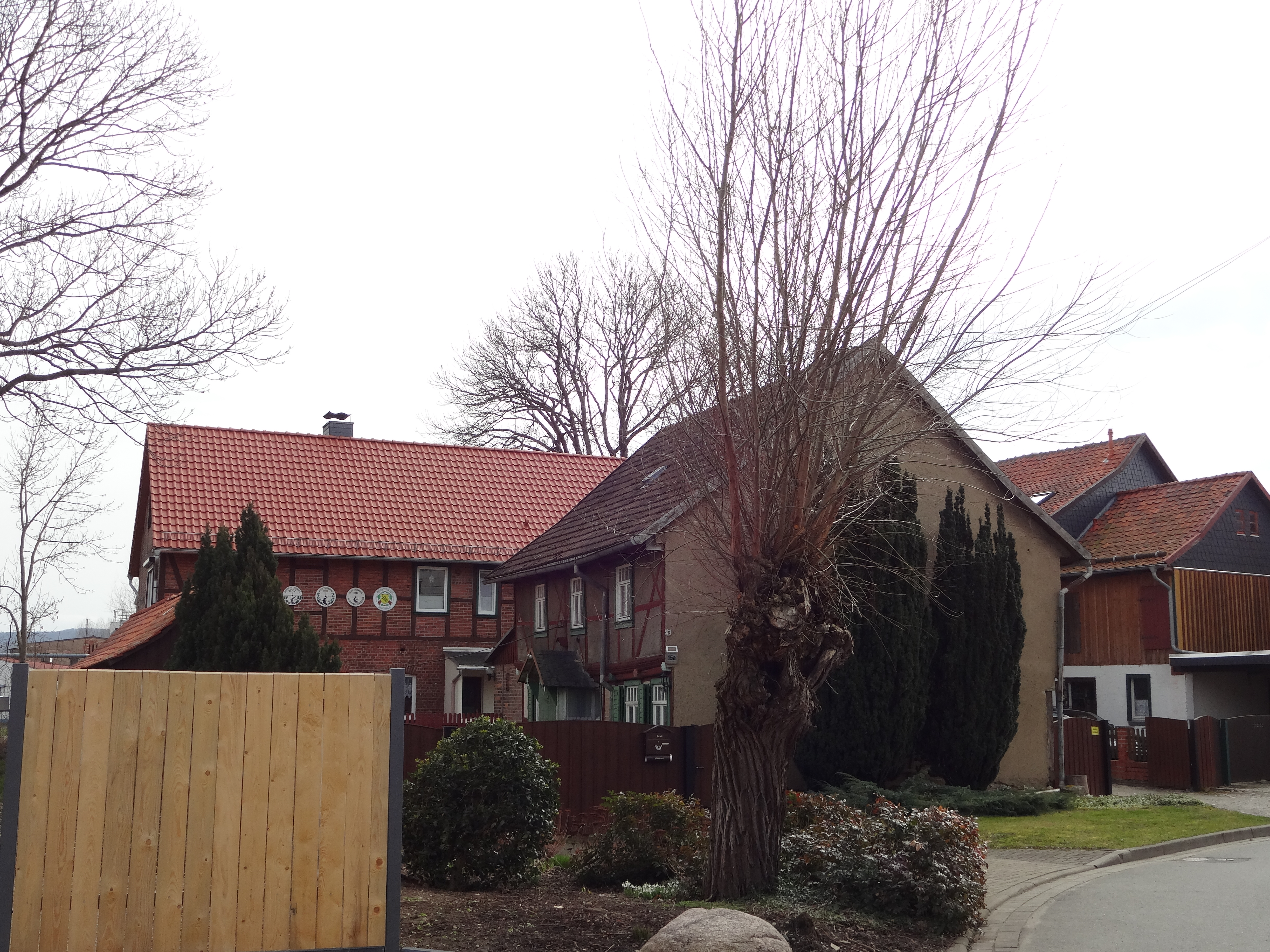 denkmalgeschütztes Bauernhaus in der Dorfstraße 15a in Reddeber, Ortsteil von Wernigerode